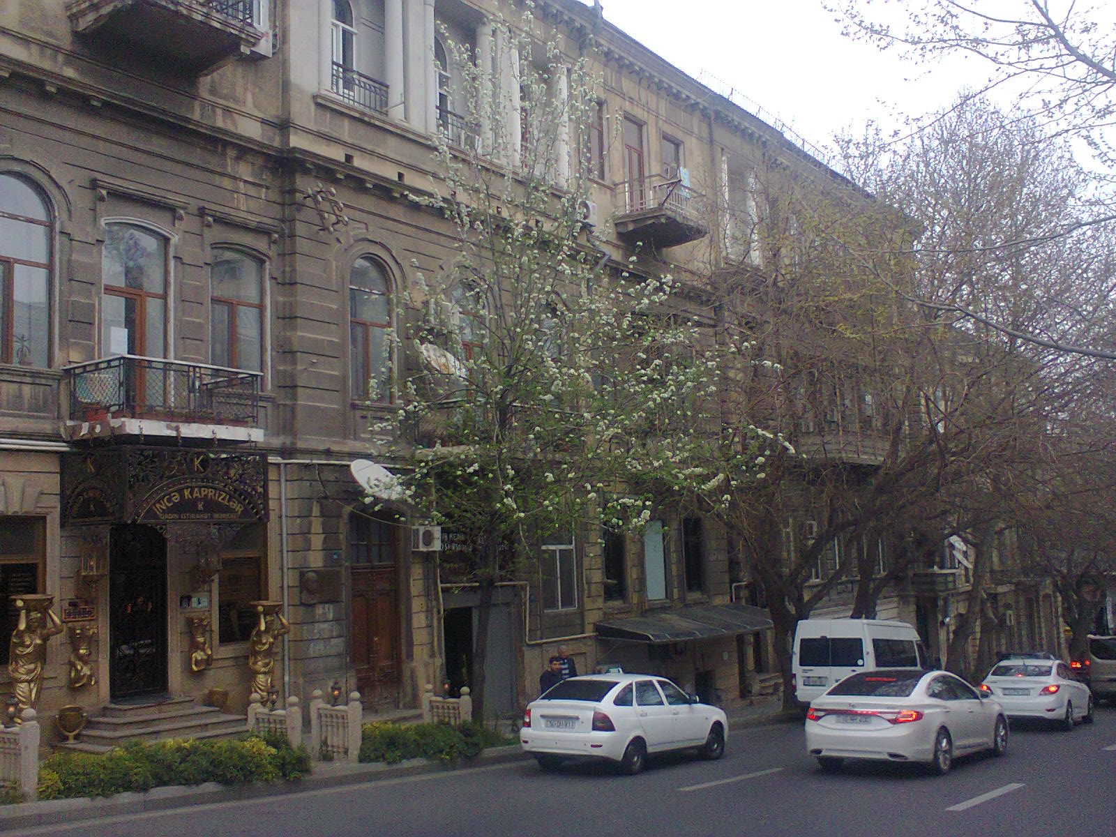 Дом где жил Abbasqulu Abbaszadə